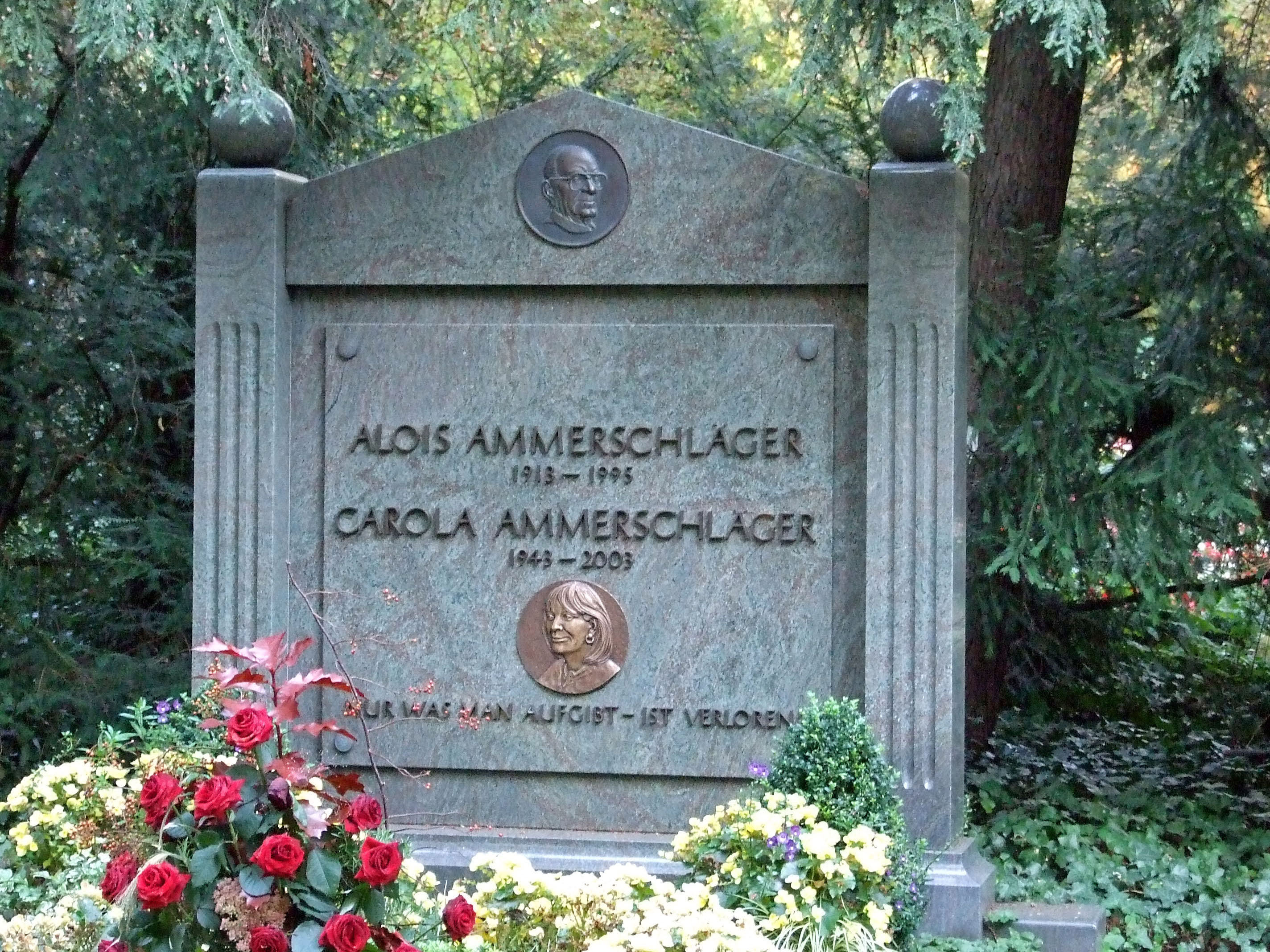 Ammerschläger Grabmal auf dem Hauptfriedhof in Ffm